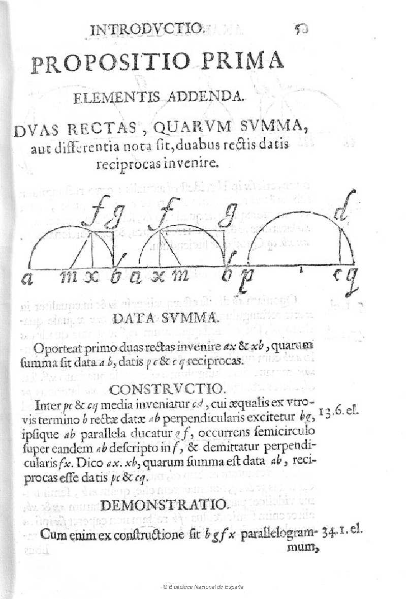 Analysis geometrica sive Nova, et vera methodus resolvendi tam problemata geometrica quam arithmeticas quaestiones : pars prima de planis authore D. Antonio Hugone de Omerique ... Autor: Omerique, Antonio Hugo de Fecha: 1698 Datos de edición: Gadibus typis Christophori de Requena